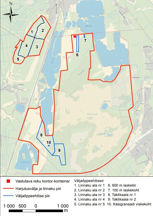 Männiku harjutusvälja väljaõppeehitised